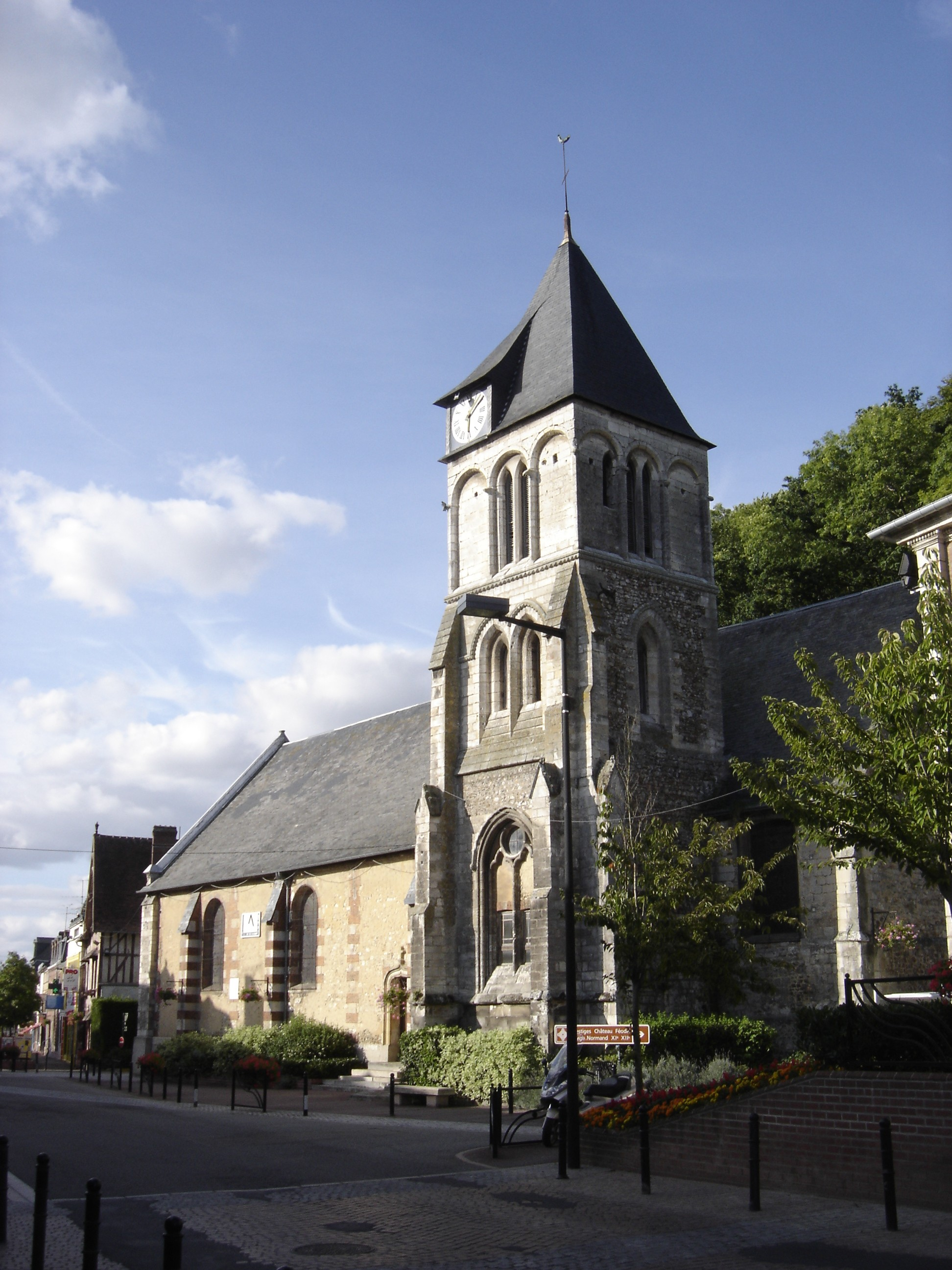 Eglise de Montfort-sur-Risle - Eure - France